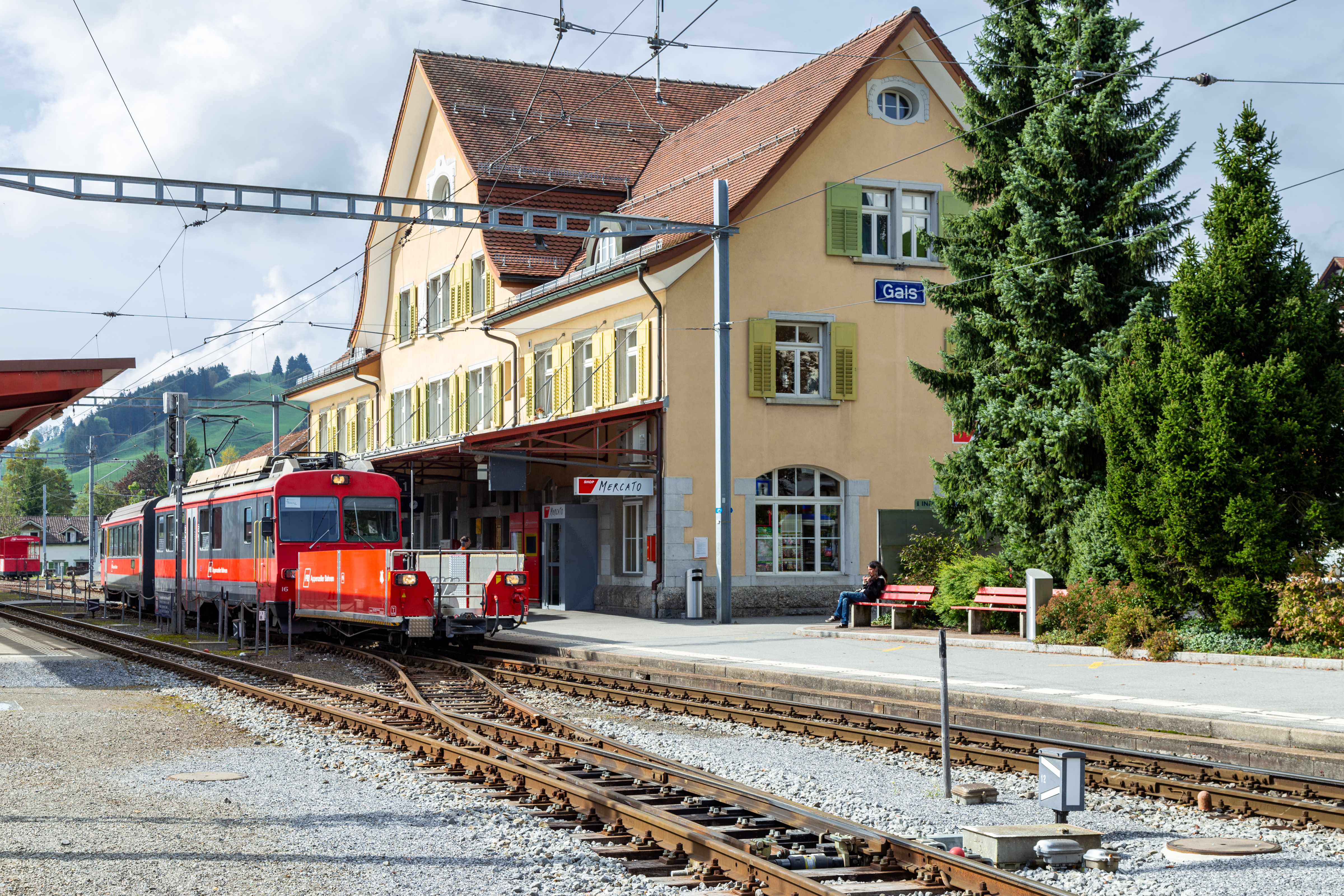 Bahnhof Gais AR der Appenzellerbahn